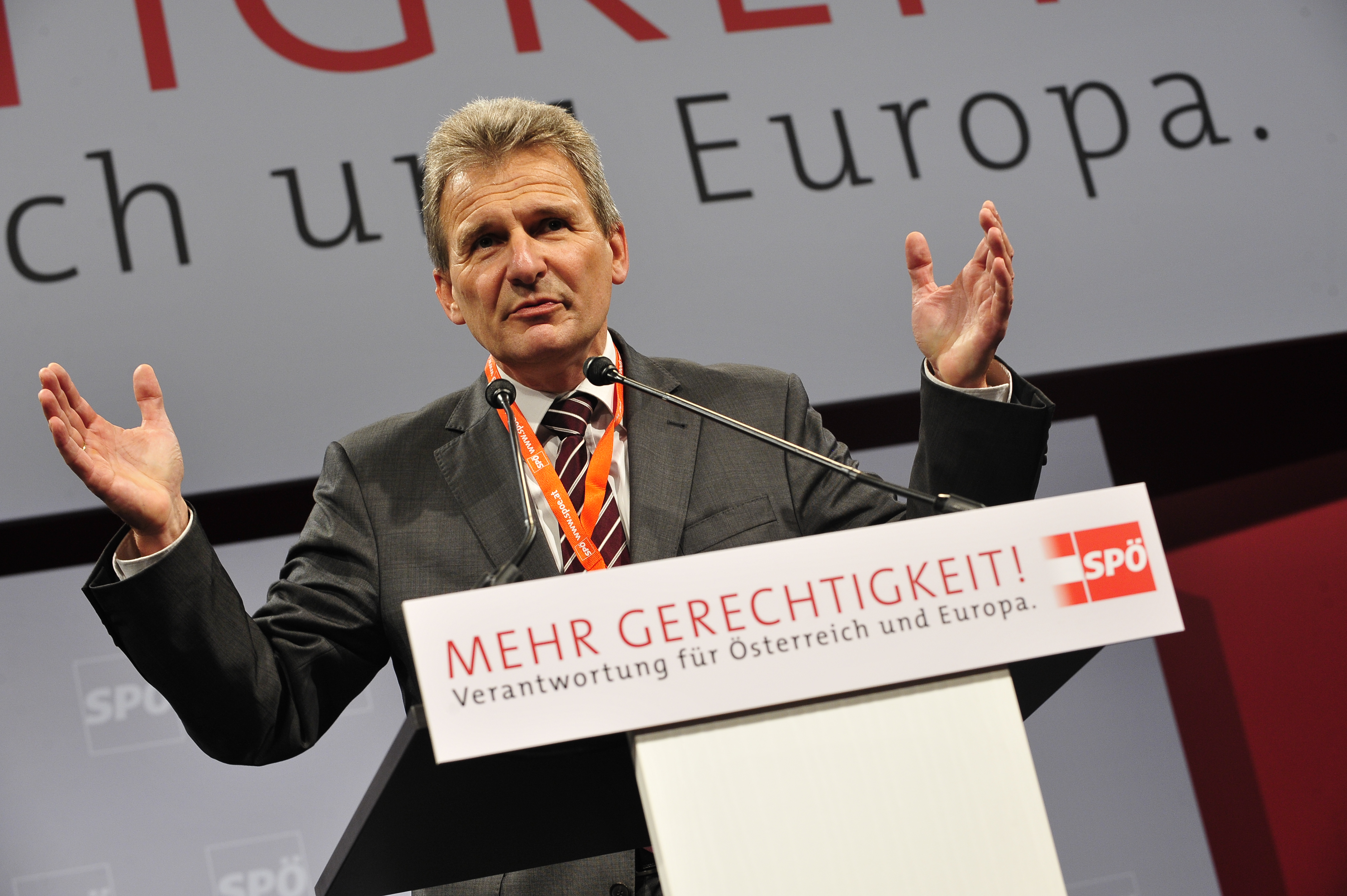 Erich Foglar am SPÖ-Bundesparteitag 2012. 13.10.2012 - VAZ St.Pölten